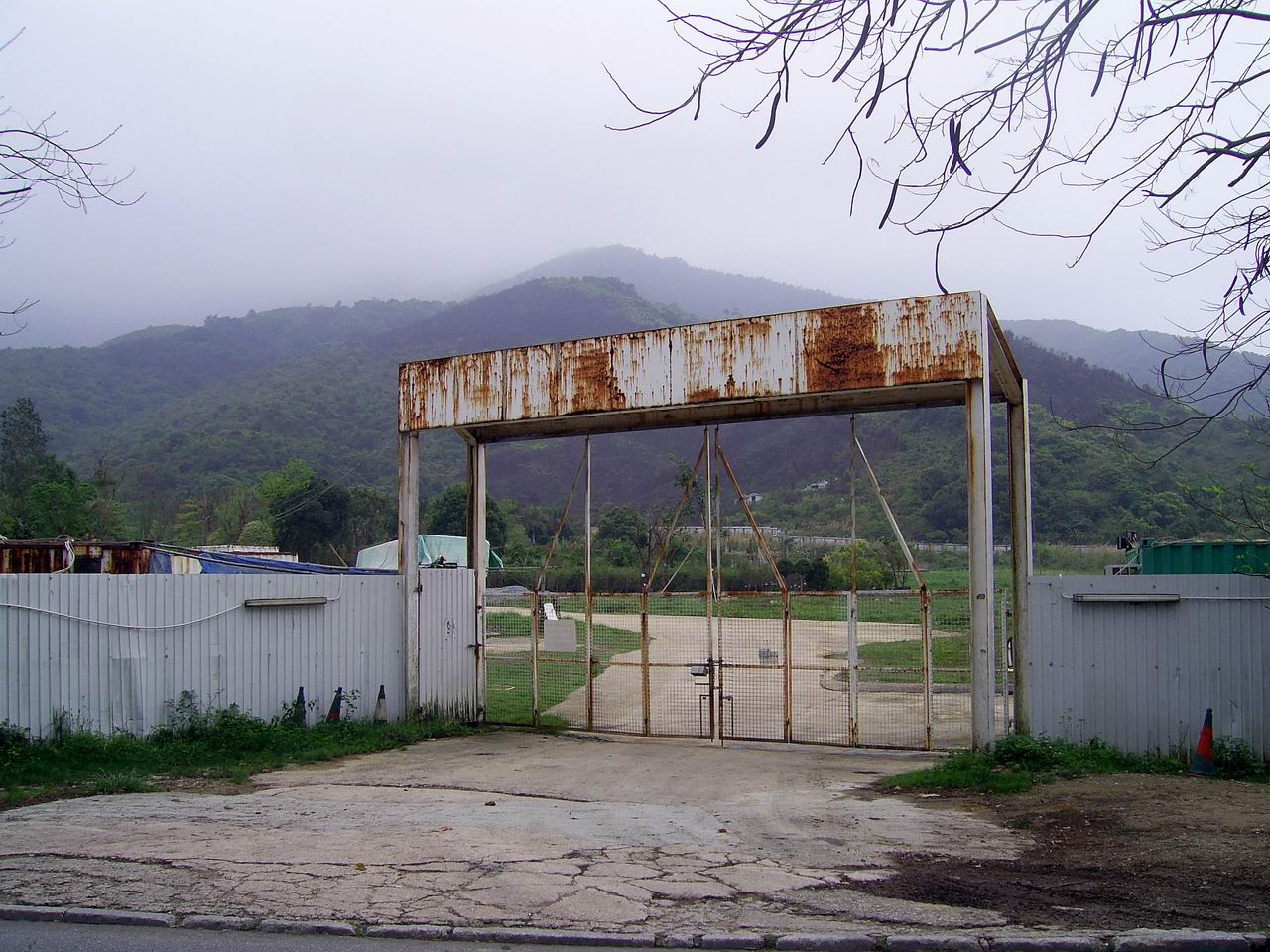 新鴻基「西沙路十四鄉項目」